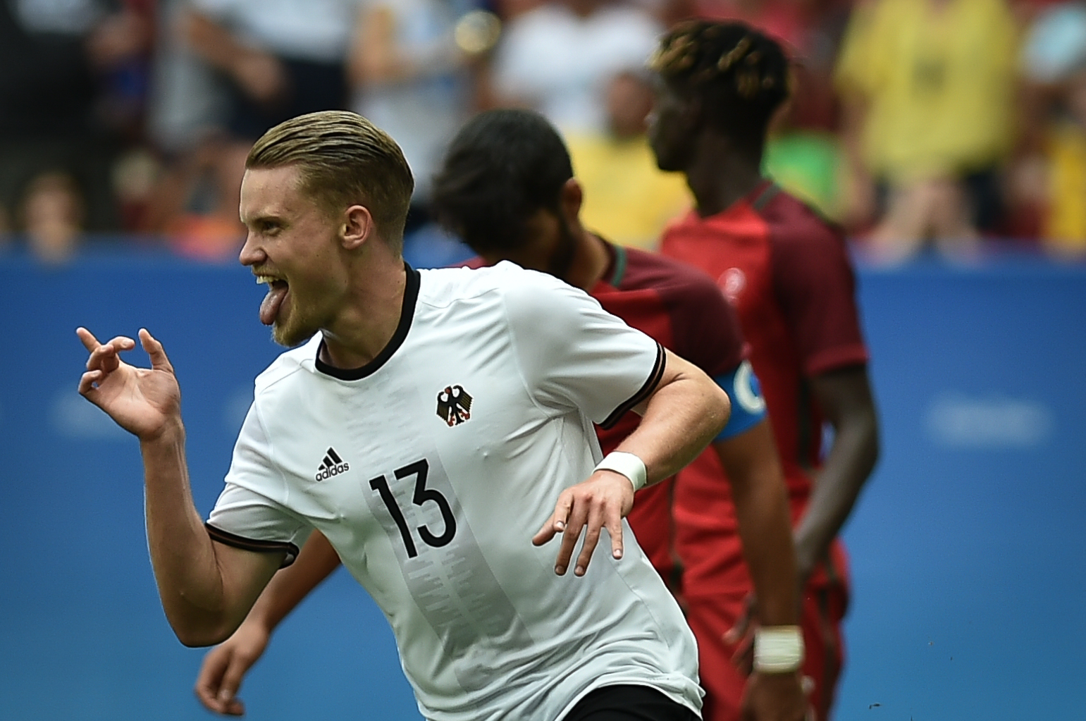 Estádio Nacional de Brasília Mané Garrincha, Brasília, DF, Brasil, 13/8/2016 Foto: Andre Borges/Agência Brasília Portigal e Alemanha jogam neste sábado (12), no Estádio Mané Garrincha, pelas quartas de final do futebol masculino nas Olimpíadas 2016.